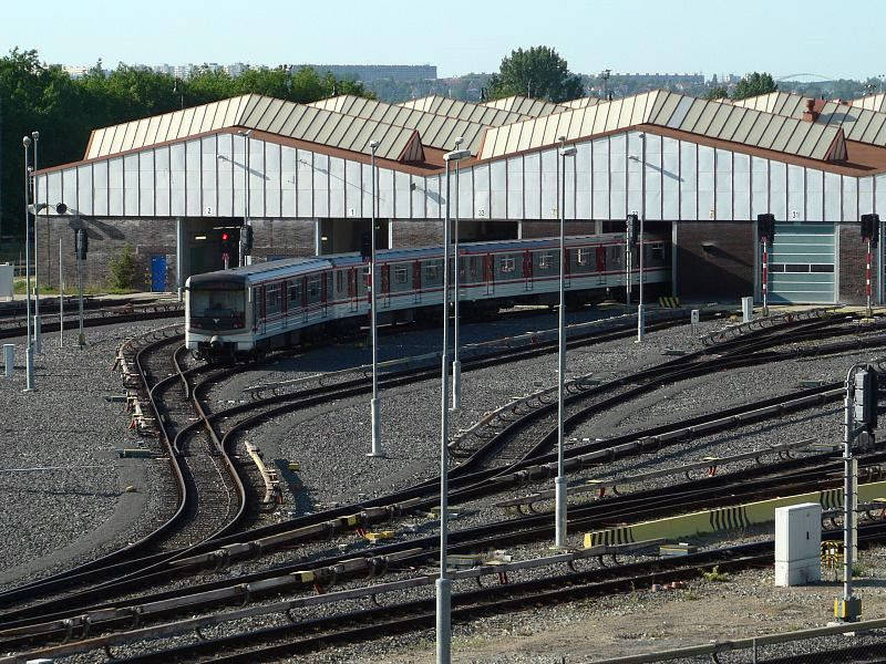 Depo Hostivar, Prague metro